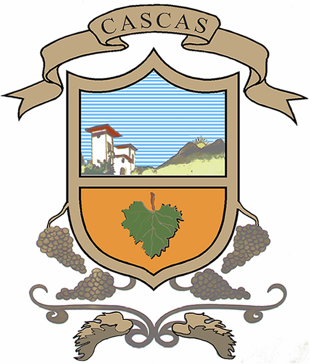 Cascas